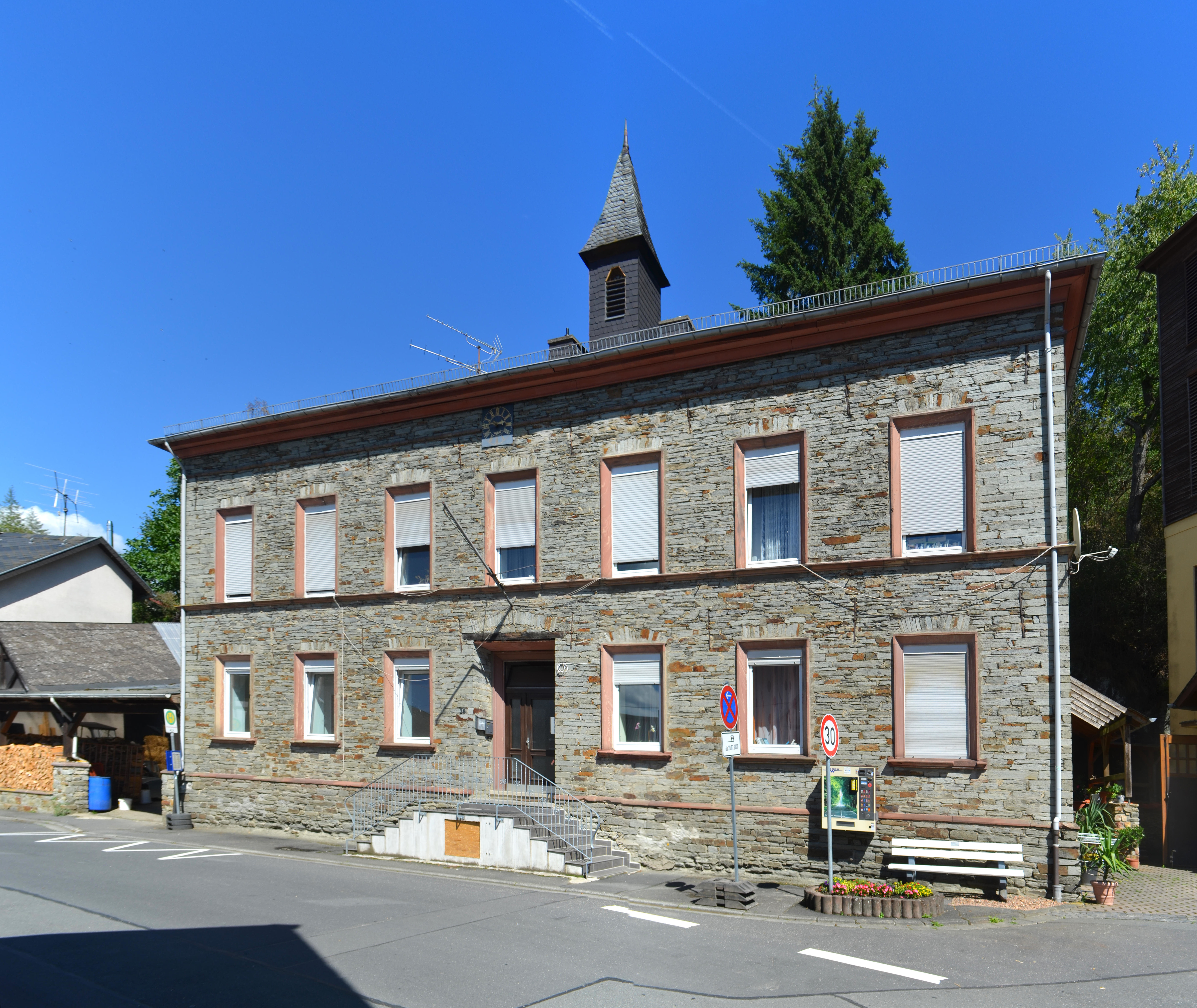 Fischbach, Rheingauer Straße 36